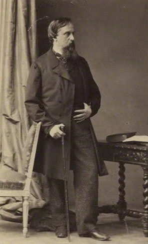 Filippo Andrea V Doria Pamphili (1813-1876)